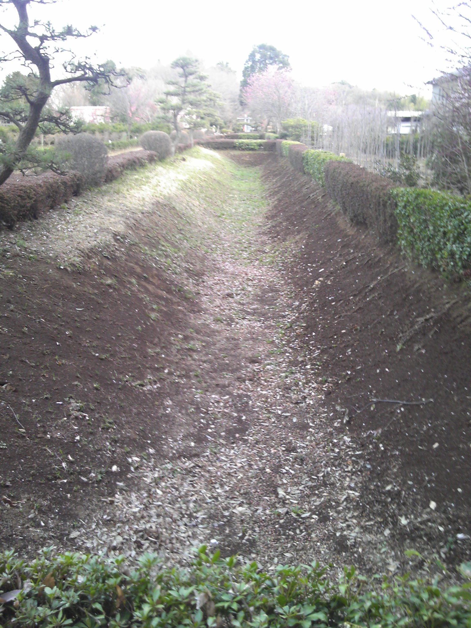 赤山陣屋の堀跡